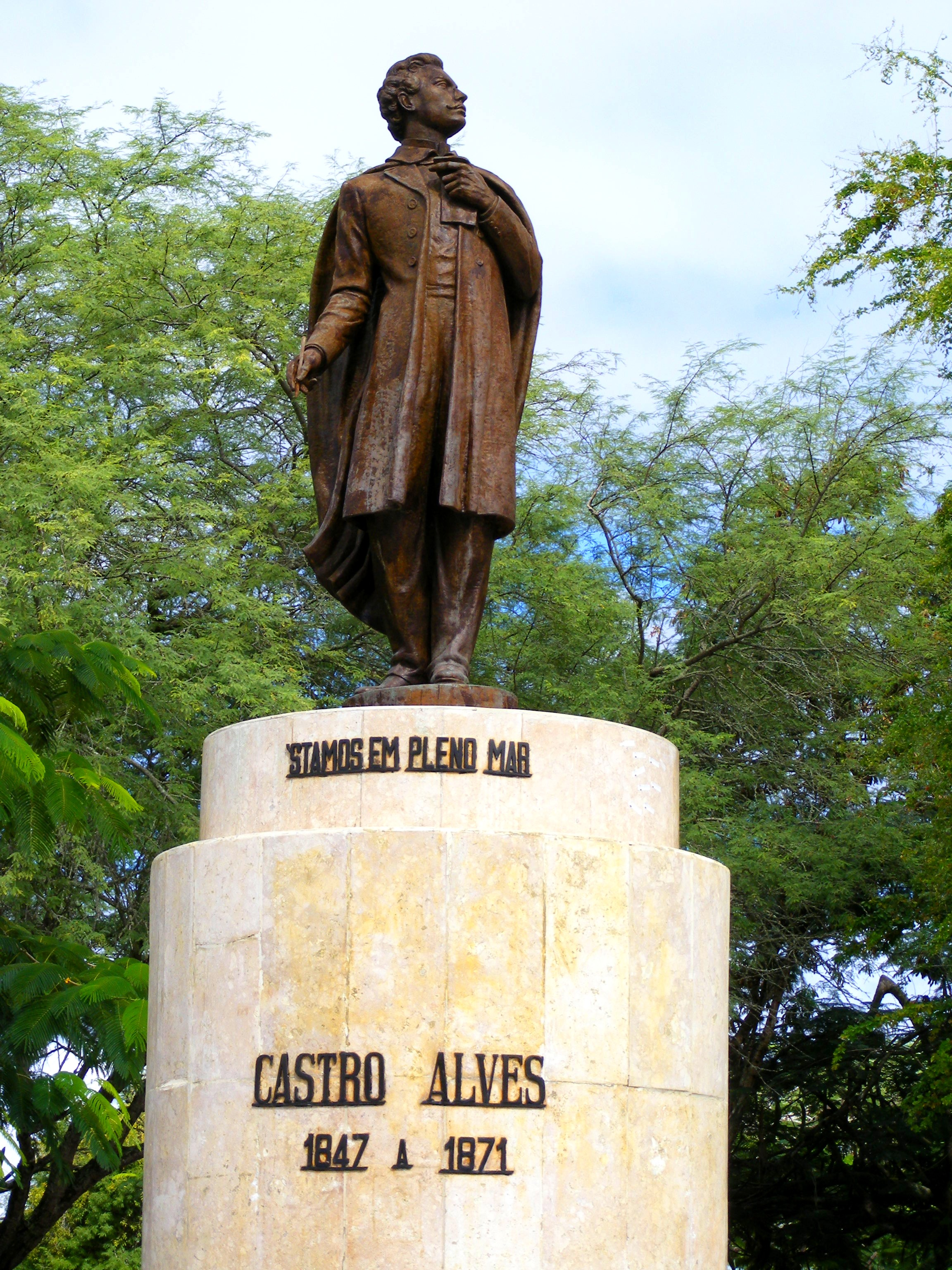 Estátua do Poeta Castro Alves na Praça da Liberdade - Castro Alves - BA